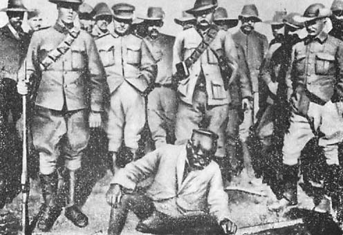 Фотография пленённого зулусского инкоси Сигананды, опубликованная в книге Э. А. Риттера "Зулус Чака"